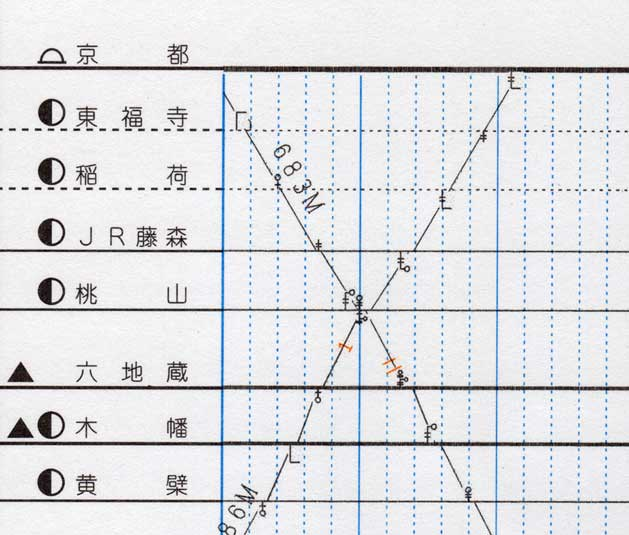 JR西日本 奈良線の列車運行図表の一部